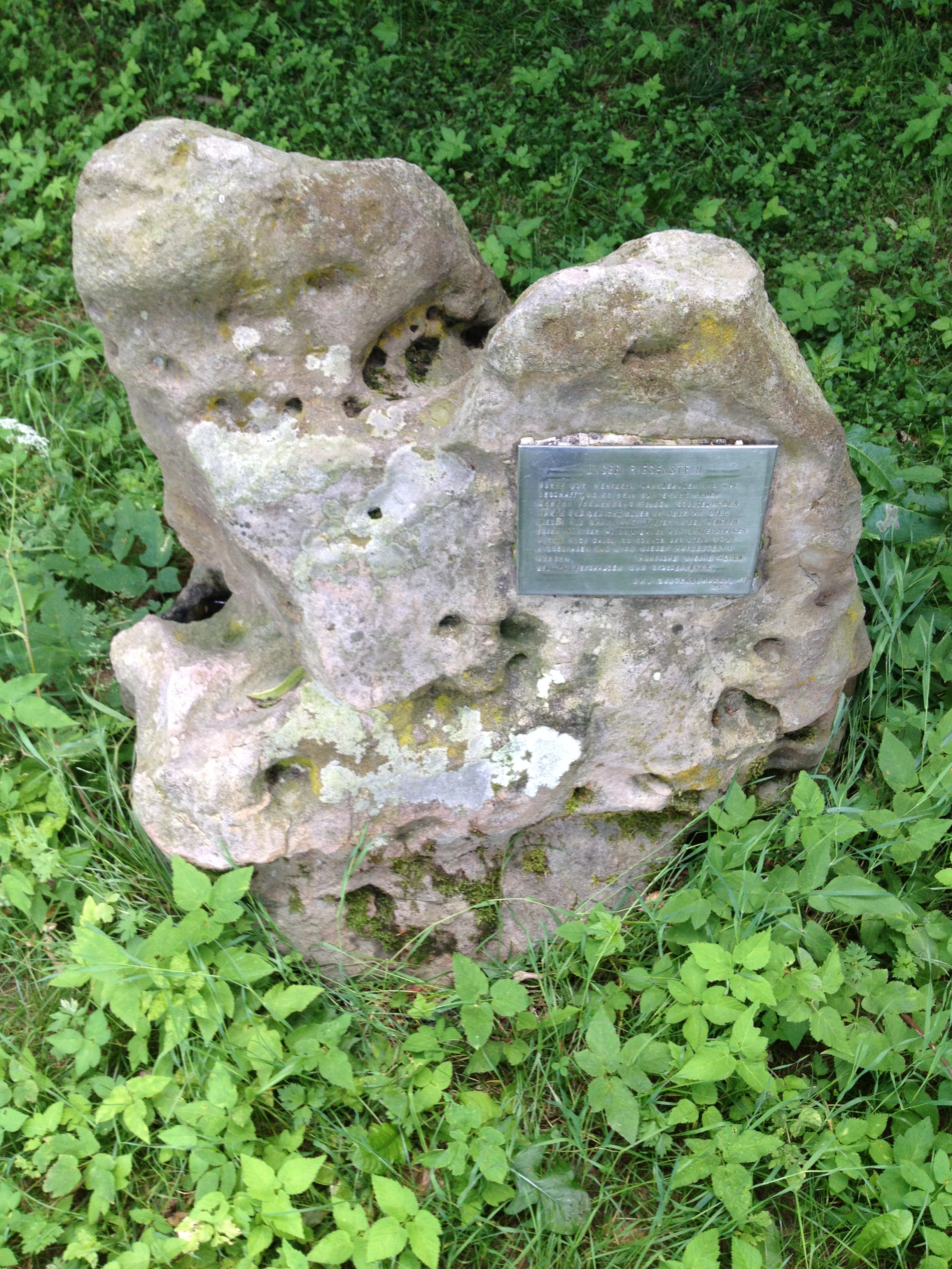 Kassel-Steig nahe Guntershausen